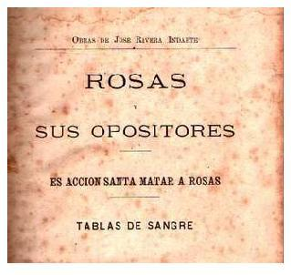 Portada de las "Tablas de Sangre", panfleto que atribuía 480 muertes a Juan Manuel de Rosas. (Véase José Rivera Indarte para una explicación detallada)